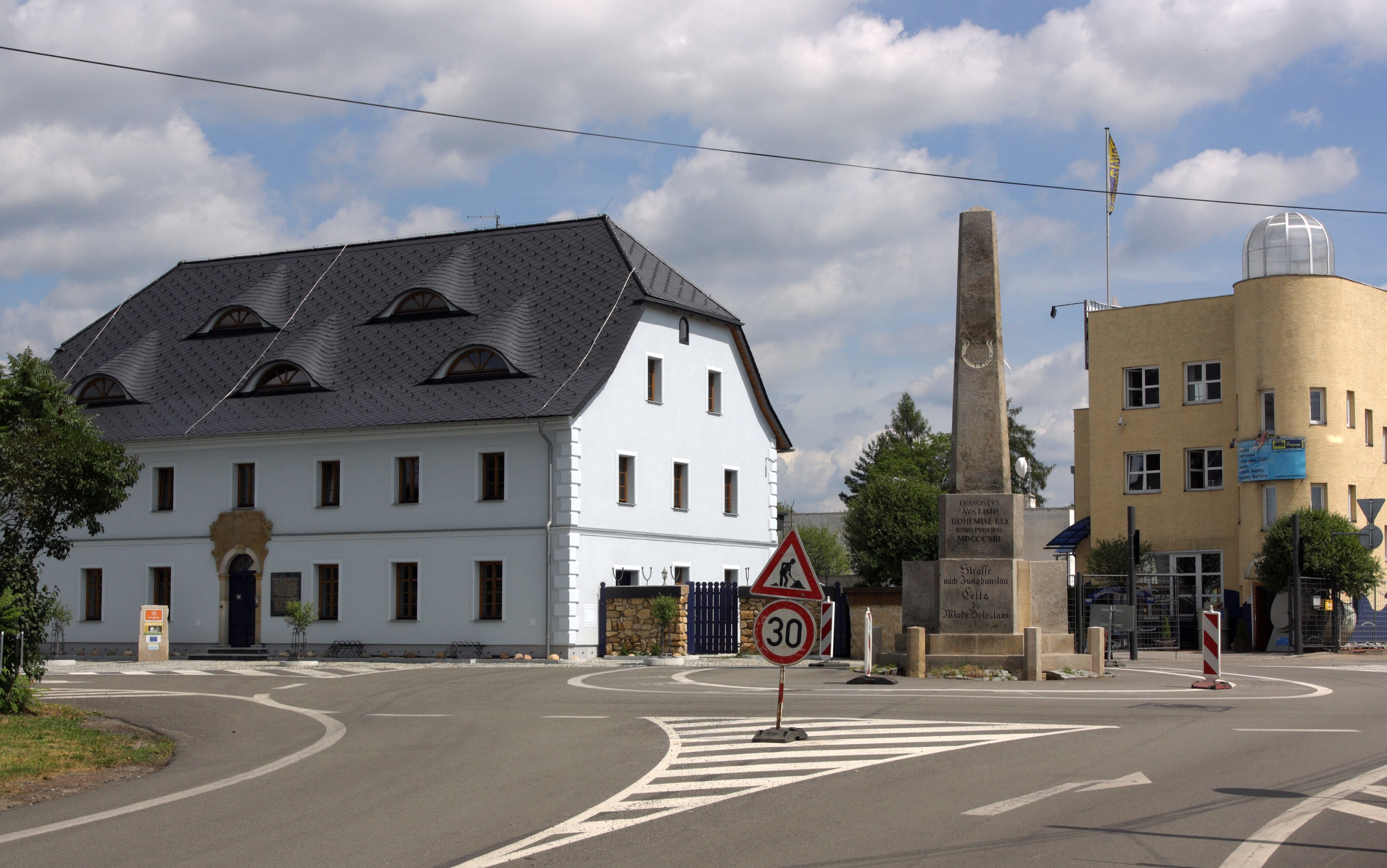 Ohrazenice - bývalý zájezdní hostinec „u Pyrámu” a kamenný rozcestník státních cest z roku 1813.